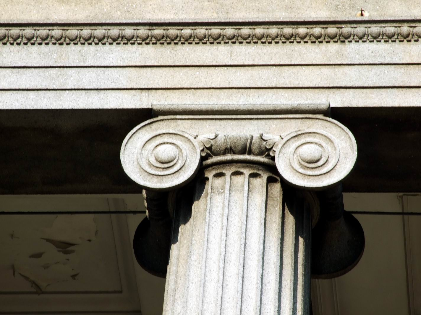 南九龍裁判法院大樓的多利克式石柱柱頭